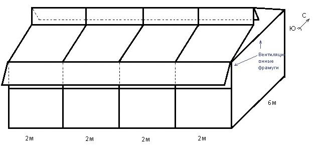 Принципиальная схема теплицы по Митлайдеру. Конструкция Миттлайдеровской теплицы. Организация фрамуг и ориентация теплицы по сторонам света.